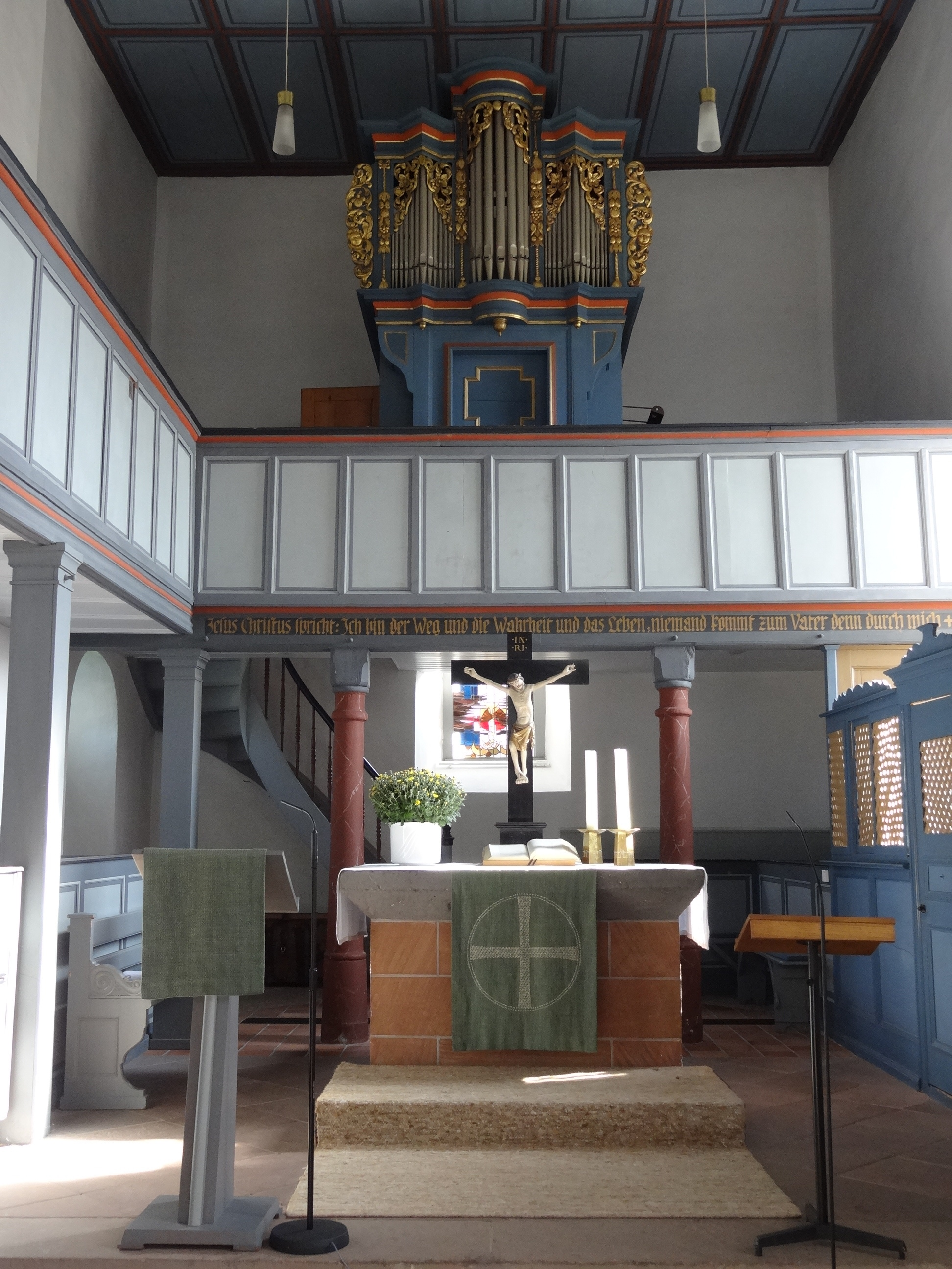 Evangelische Pfarrkirche Trais-Münzenberg